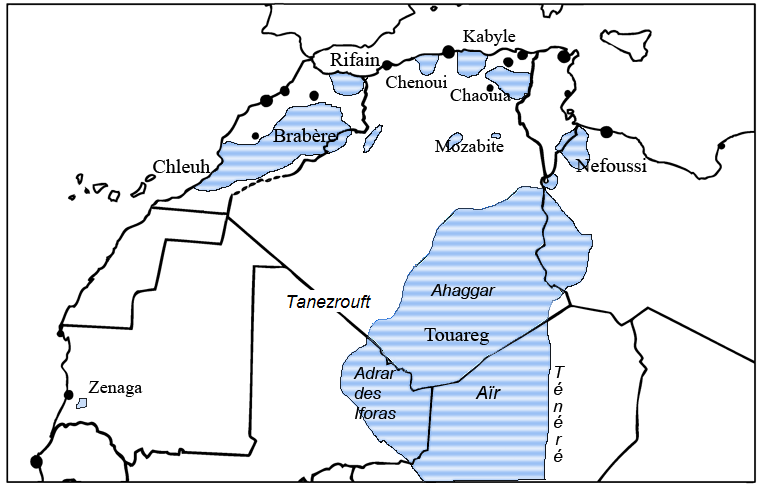 Grandes aires linguistiques berbérophones, auteur : P. Andries